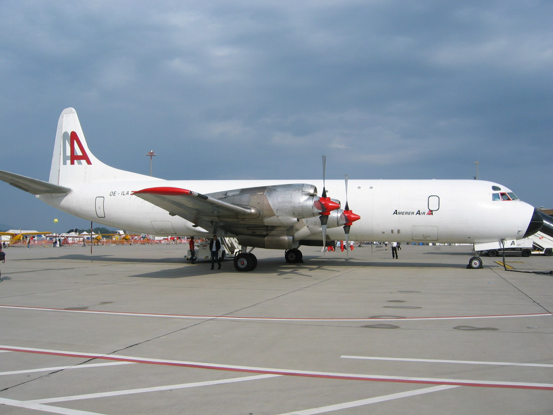 Lockheed Electra aufgenommen in Zürich Fotografiert am 11. September 2004 Alexander Flühmann GNU FDL, Publikation mit Genehmigung des Fotografen